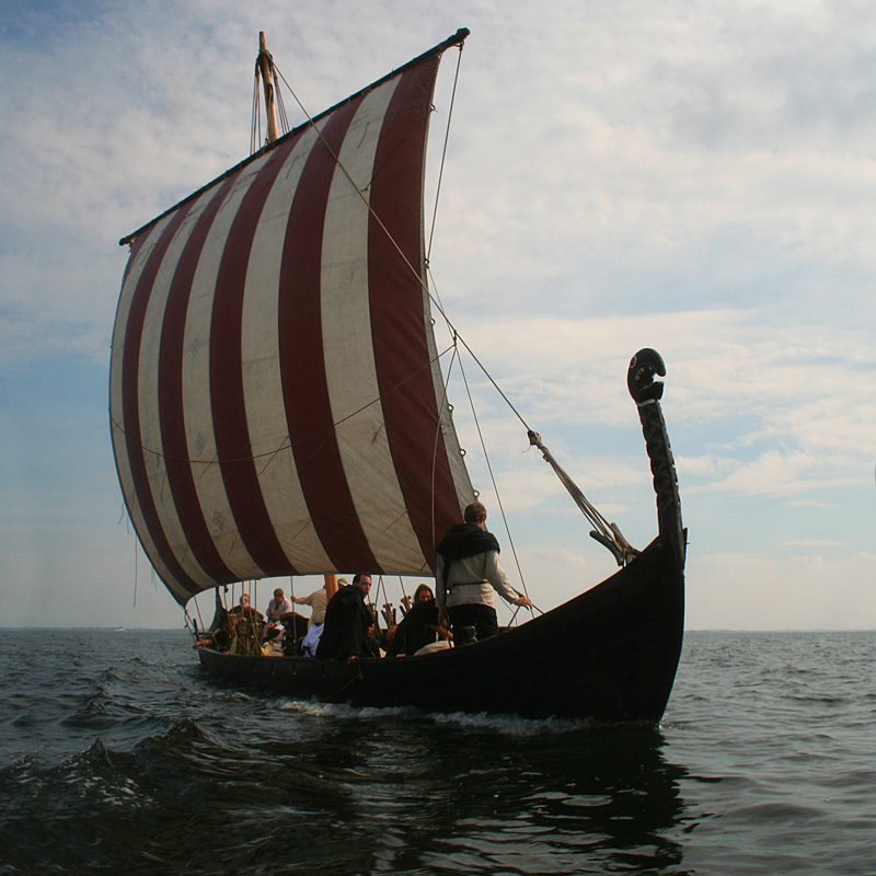 Viking ship Sebbe Als of Augustenborg, Denmark under sail.